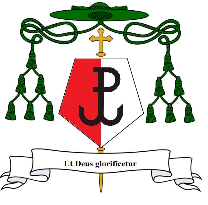 Herb biskupa Józefa Gucwy